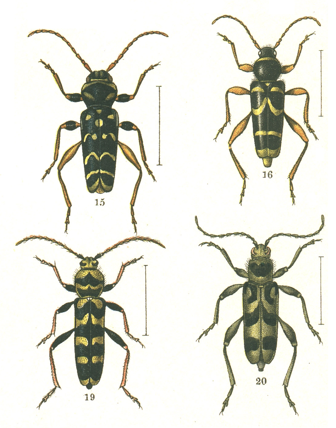 15 Plagionotus arcuatus - 16 Clytus arietis - 19 Plagionotus floralis - 20 Anthoboscus herbsti